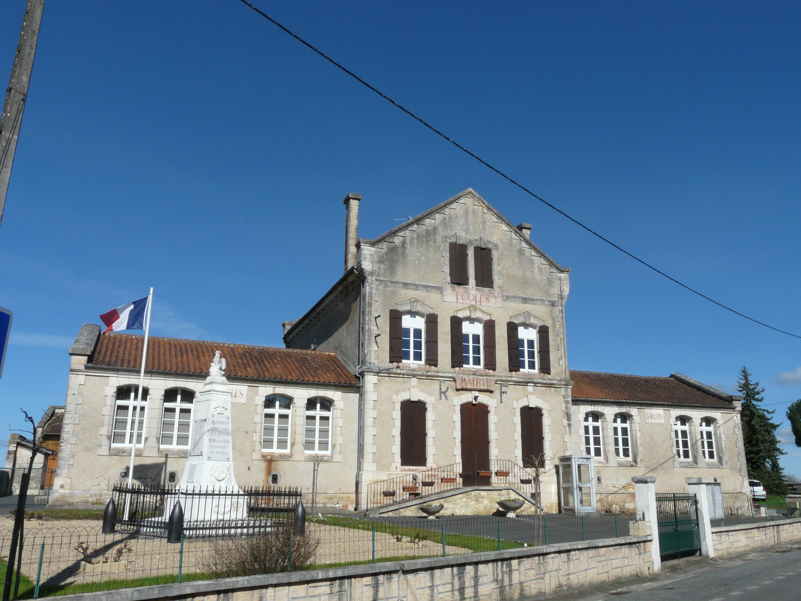 La mairie de Saint-Michel-de-Double, Dordogne, France.